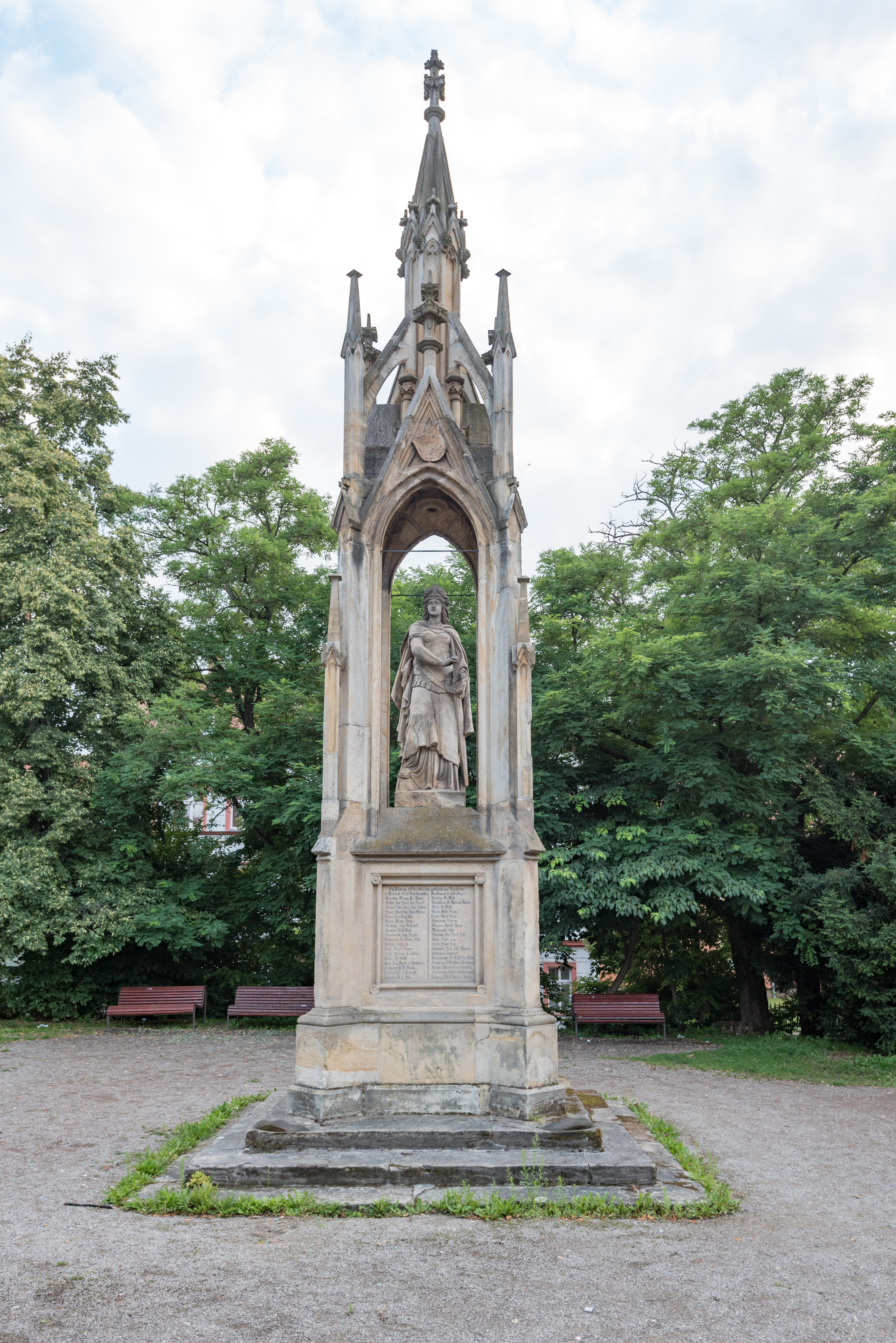 Naumburg (Saale), Kramerplatz, Kriegerdenkmal